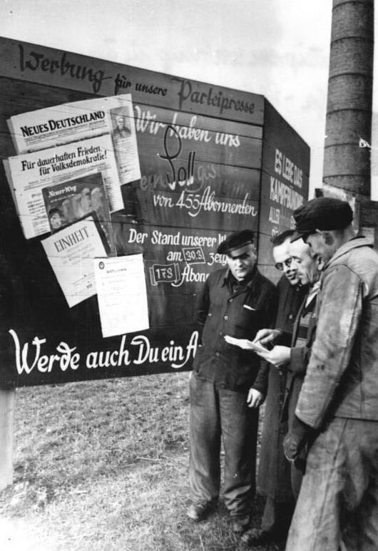 Zentralbild Ben-Schä. 7.4.1951. Parteipressewerbung in den Ifa-Schlepperwerken in Nordhausen.